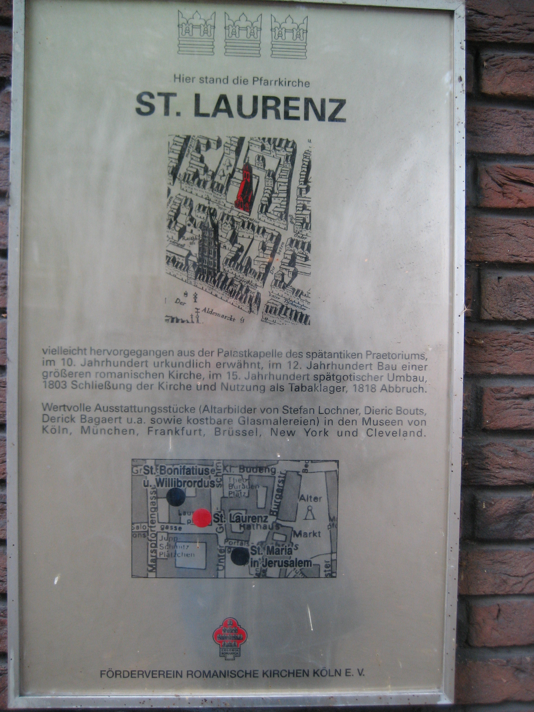 Info-Tafel am Standort der St. Laurenz-Kirche am Laurenzplatz in Köln. Die Kirche wurde 1818 abgebrochen! Text der Info-Tafel: Hier stand die Pfarrkirche ST. LAURENZ vielleicht hervorgegangen aus der Palastkapelle des spätantiken Praetoriums, im 10. Jahrhundert urkundlich erwähnt, im 12. Jahrhundert Bau einer größeren romanischen Kirche, im 15. Jahrhundert spätgotischer Umbau, 1803 Schließung der Kirche und Nutzung als Tabaklager, 1818 Abbruch. Wertvolle Ausstattungsstücke (Altarbilder von Stefan Lochner, Dieric Bouts, Derick Bagaert u.a. sowie kostbare Glasmalereien) in den Museen von Köln, München, Frankfurt, Brüssel, New York und Cleveland. FÖRDERVEREIN ROMANISCHE KIRCHEN KÖLN E. V.